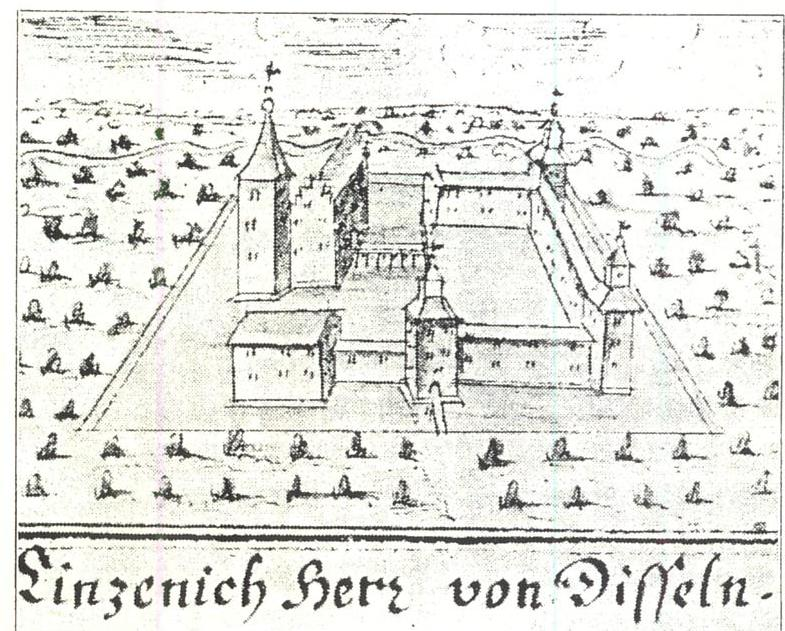 Schloss Linzenich in Jülich-Bourheim